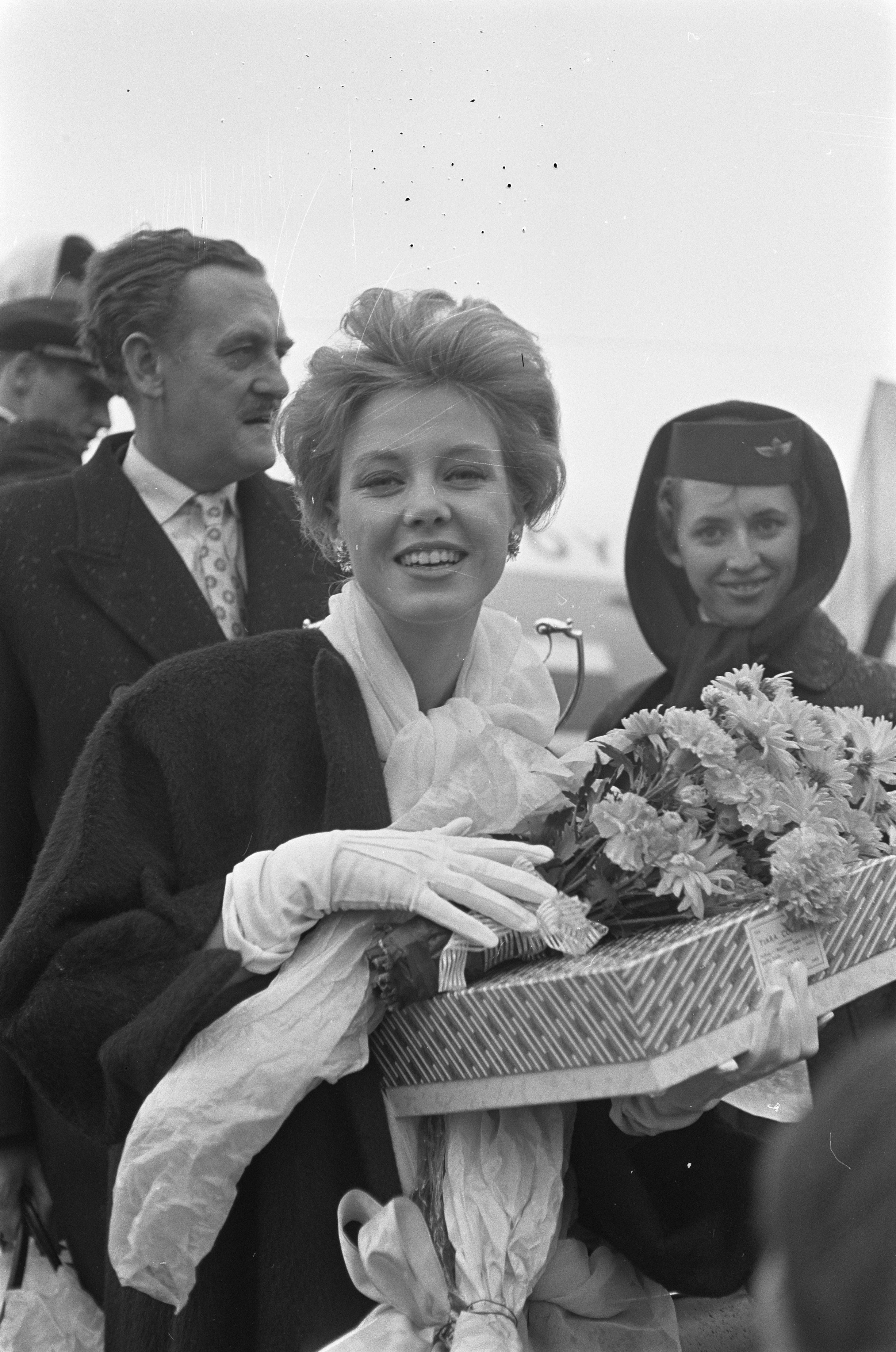 Collectie / Archief : Fotocollectie Anefo Reportage / Serie : Miss World 1959 Beschrijving : Aankomst van Corine Rottschäfer (miss World 1959) op Schiphol Datum : 13 november 1959 Locatie : Noord-Holland, Schiphol Trefwoorden : aankomsten, missen, missverkiezingen, vliegvelden Persoonsnaam : Rottschäfer, Corine Fotograaf : Fotograaf Onbekend / Anefo Auteursrechthebbende : Nationaal Archief Materiaalsoort : Negatief (zwart/wit) Nummer archiefinventaris : bekijk toegang 2.24.01.05 Bestanddeelnummer : 910-8184